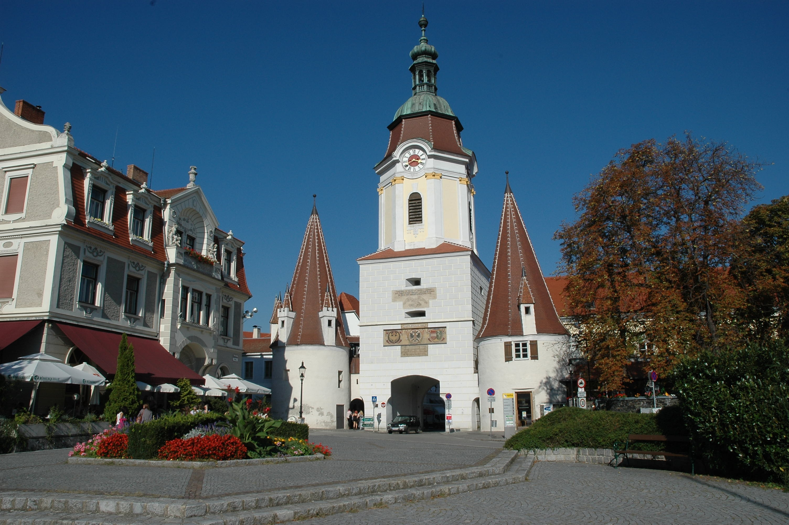 Steiner Tor, Krems